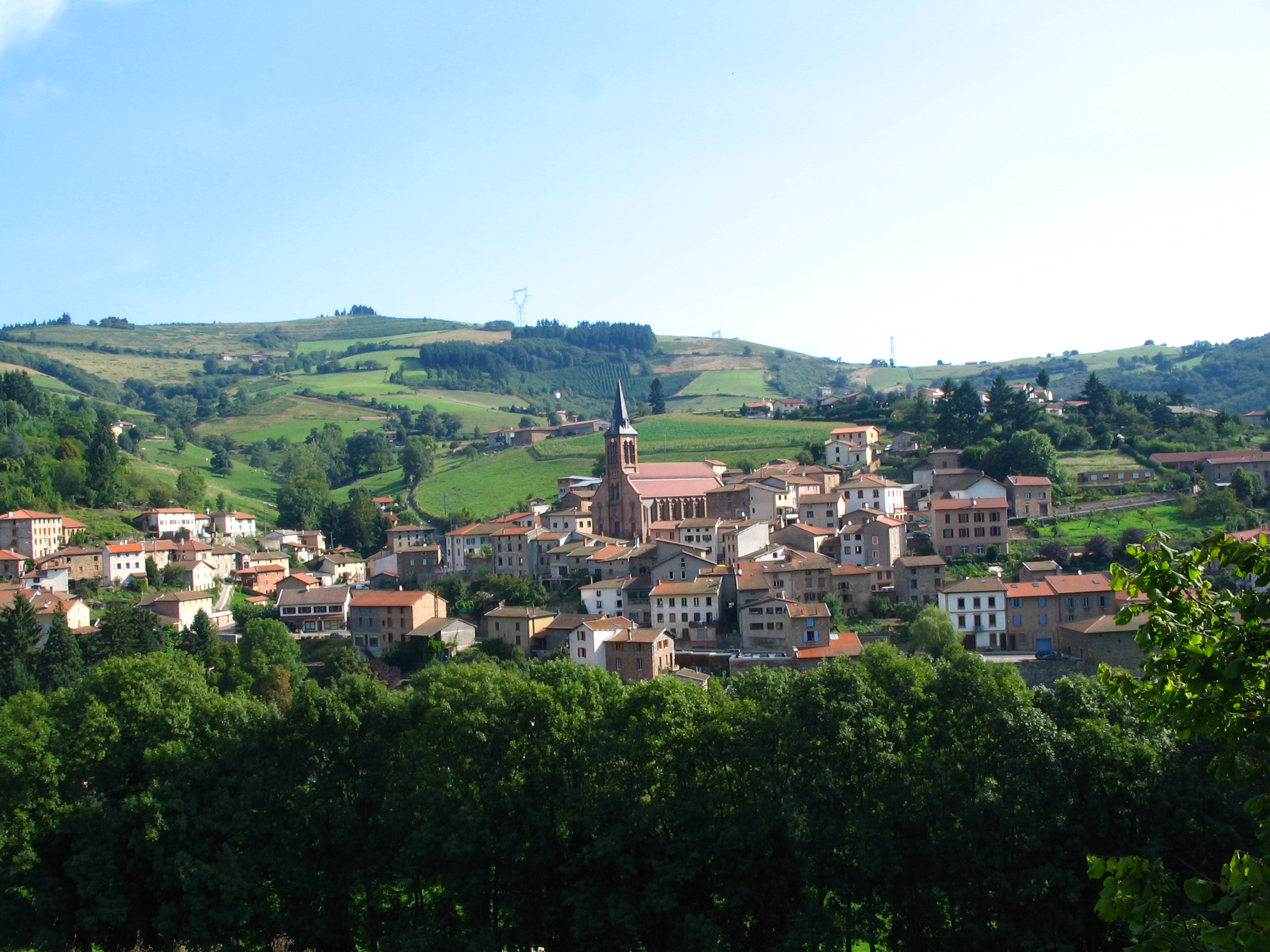 Valsonne, Rhône, France.